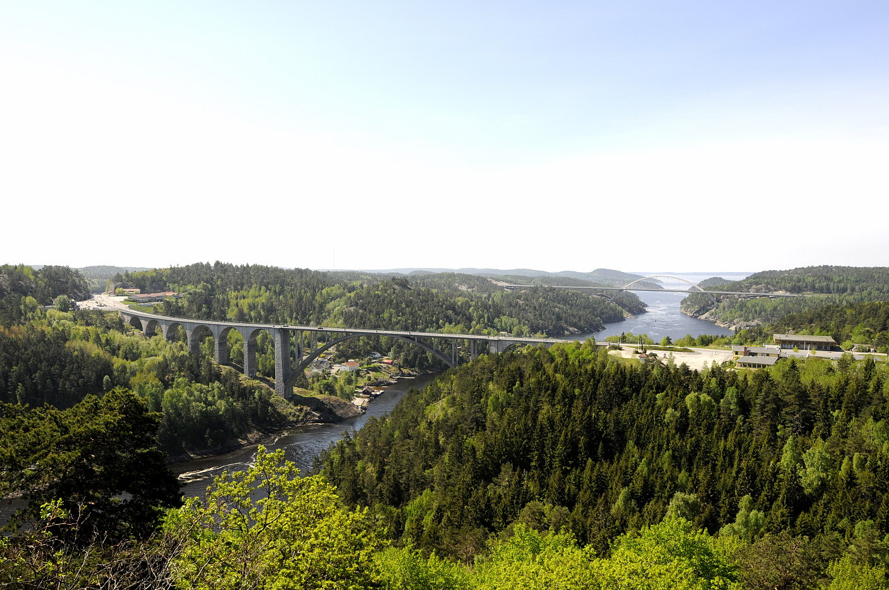 Utsikt fra Hjelmkollen mot gamle og nye Svinesundbroene.